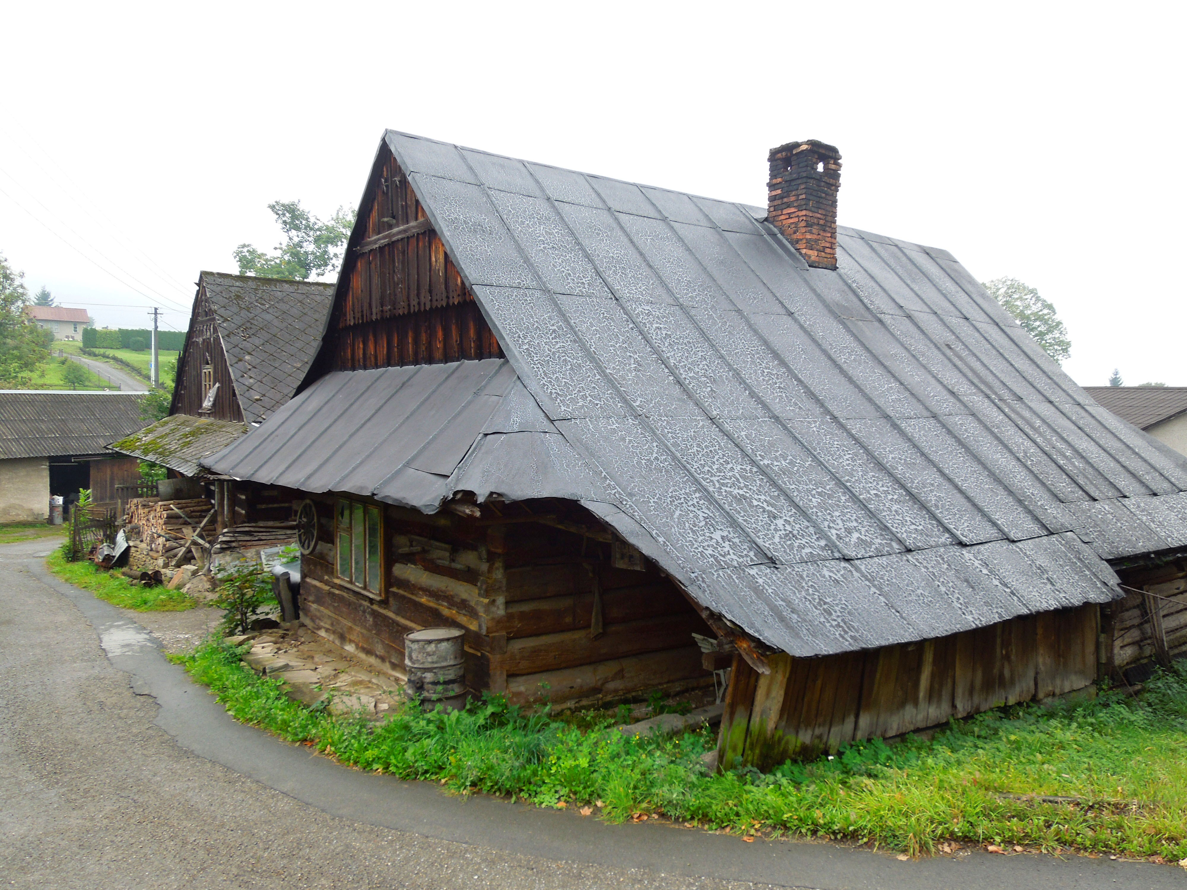 venkovská usedlost (čp.79 + 78)